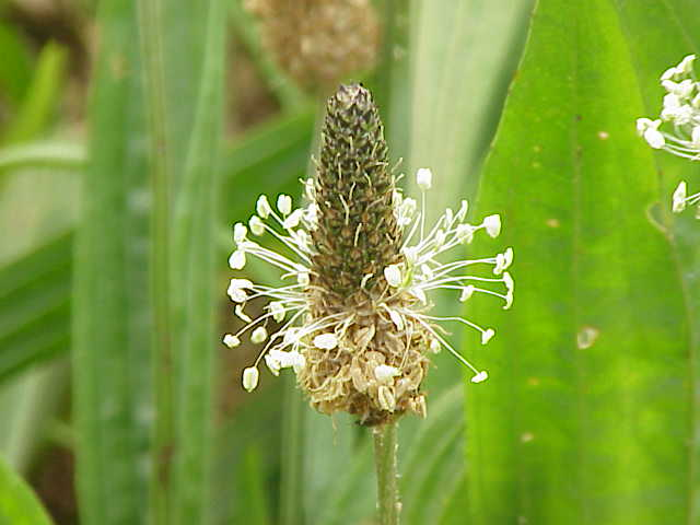 Species: Plantago lanceolata Family: ' Image No. 1